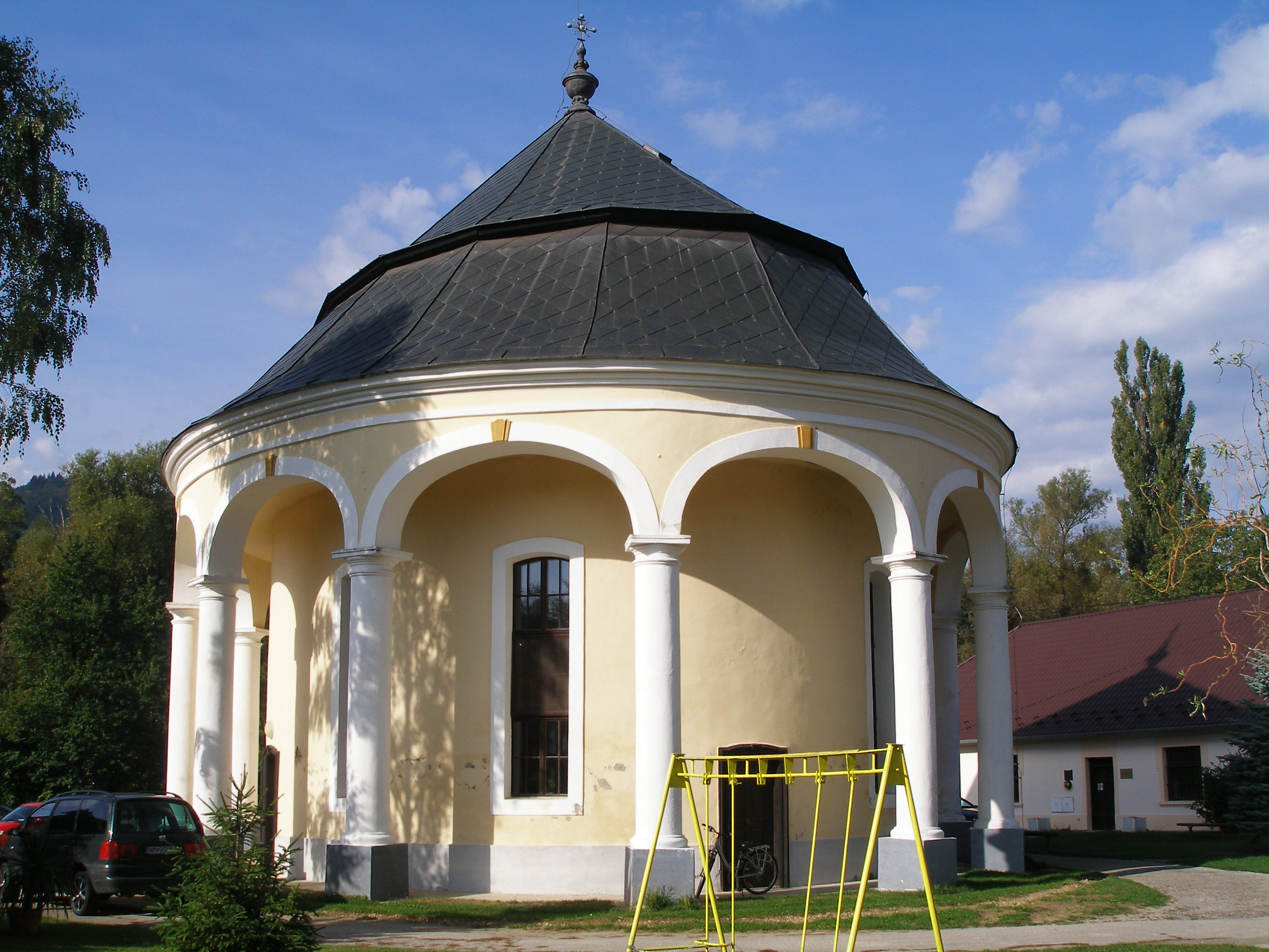 Kostel v Zemianskom Podhradie (pohled od východu).